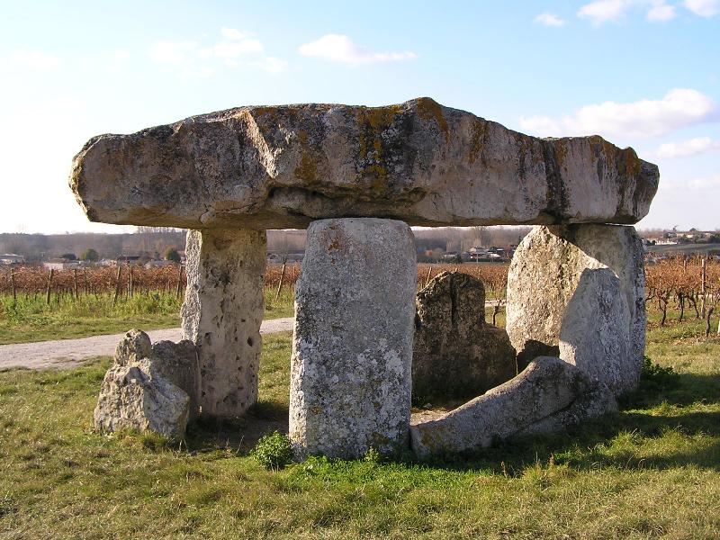 Dolmen de Saint-Fort-sur-le-Né, Charente, France